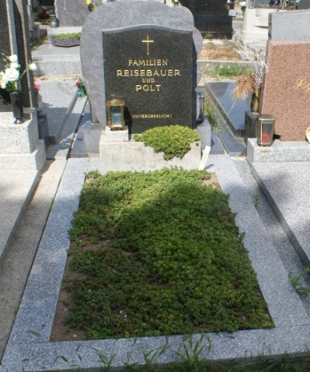 Roman Polt-Friedhof Kagran